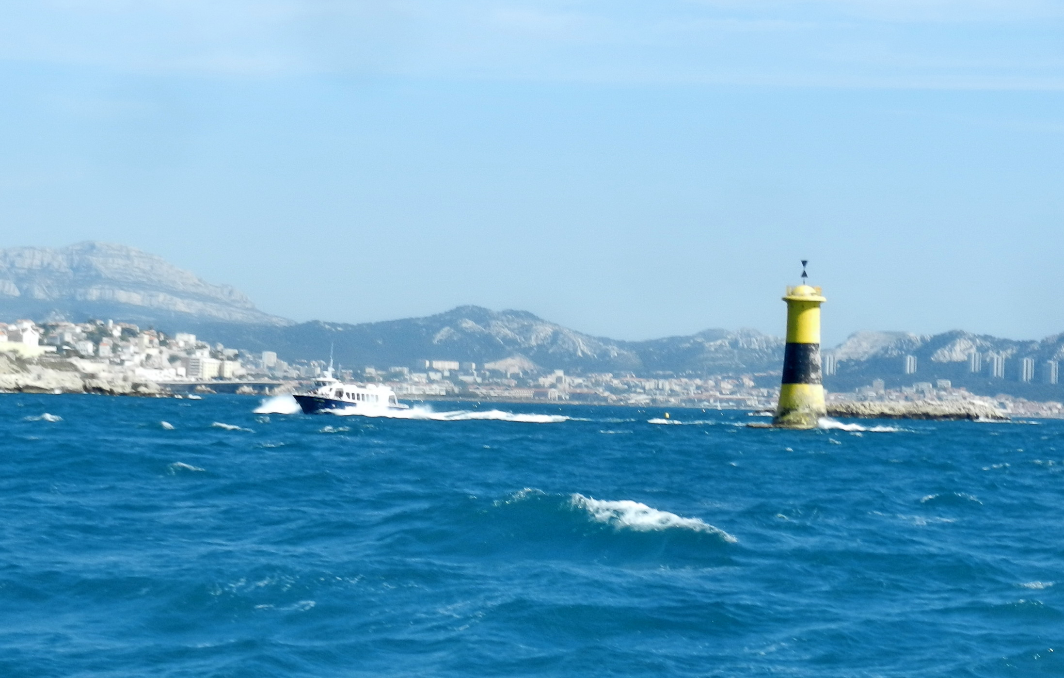 Марсель